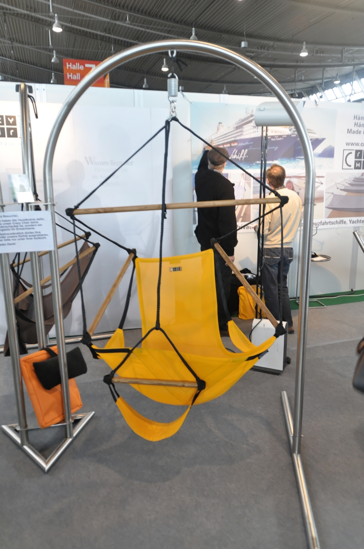 Messe Garten 2012 in Stuttgart Dieses Foto entstand durch Unterstützung des gemeinnützigen Vereins Skillshare.eu Skillshare e.V. ist ein eingetragener gemeinnütziger Verein zur Förderung der Bildung durch Unterstützung der Erstellung, Sammlung und Verbreitung so genannten freien Wissens. IBAN: DE16 8306 5408 0004 8850 66 BIC: GENODEF1SLR Bank: VR-Bank Altenburger Land